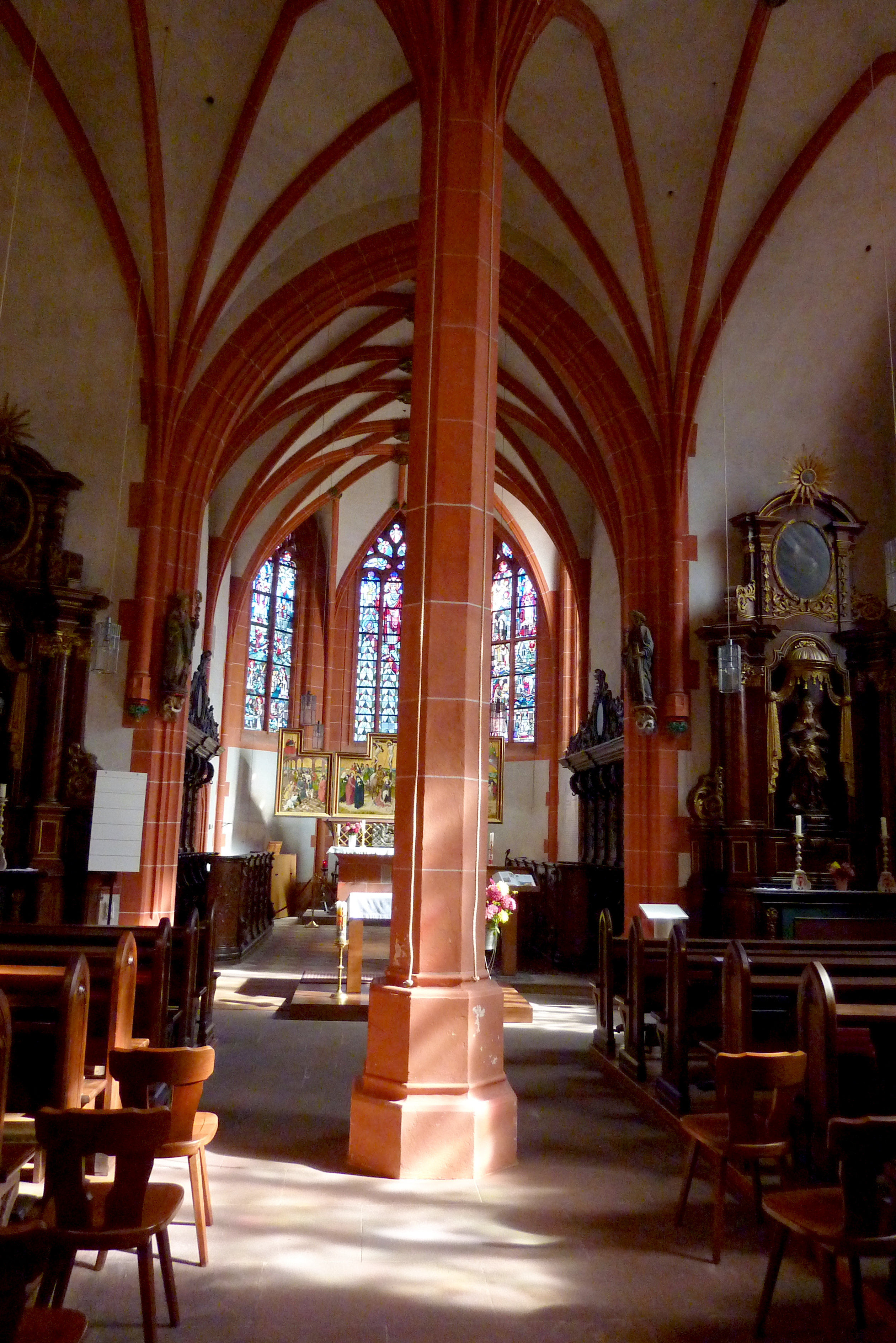 Stiftskapelle des St. Nikolaus-Hospitals (Cusanusstift) in Bernkastel-Kues im Landkreis Bernkastel-Wittlich (Rheinland-Pfalz), Innenraum